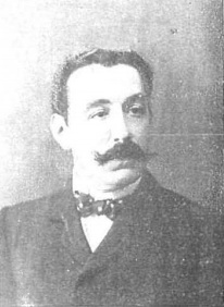 Marqués de Portazgo, alcalde de Madrid. Fotografía de Manuel Compañy.